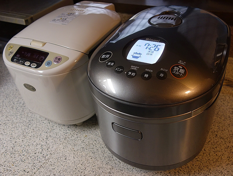 ガス炊飯器 左）NEWαかまど炊き 右）直火匠 （共に、リンナイとガス会社の共同開発）